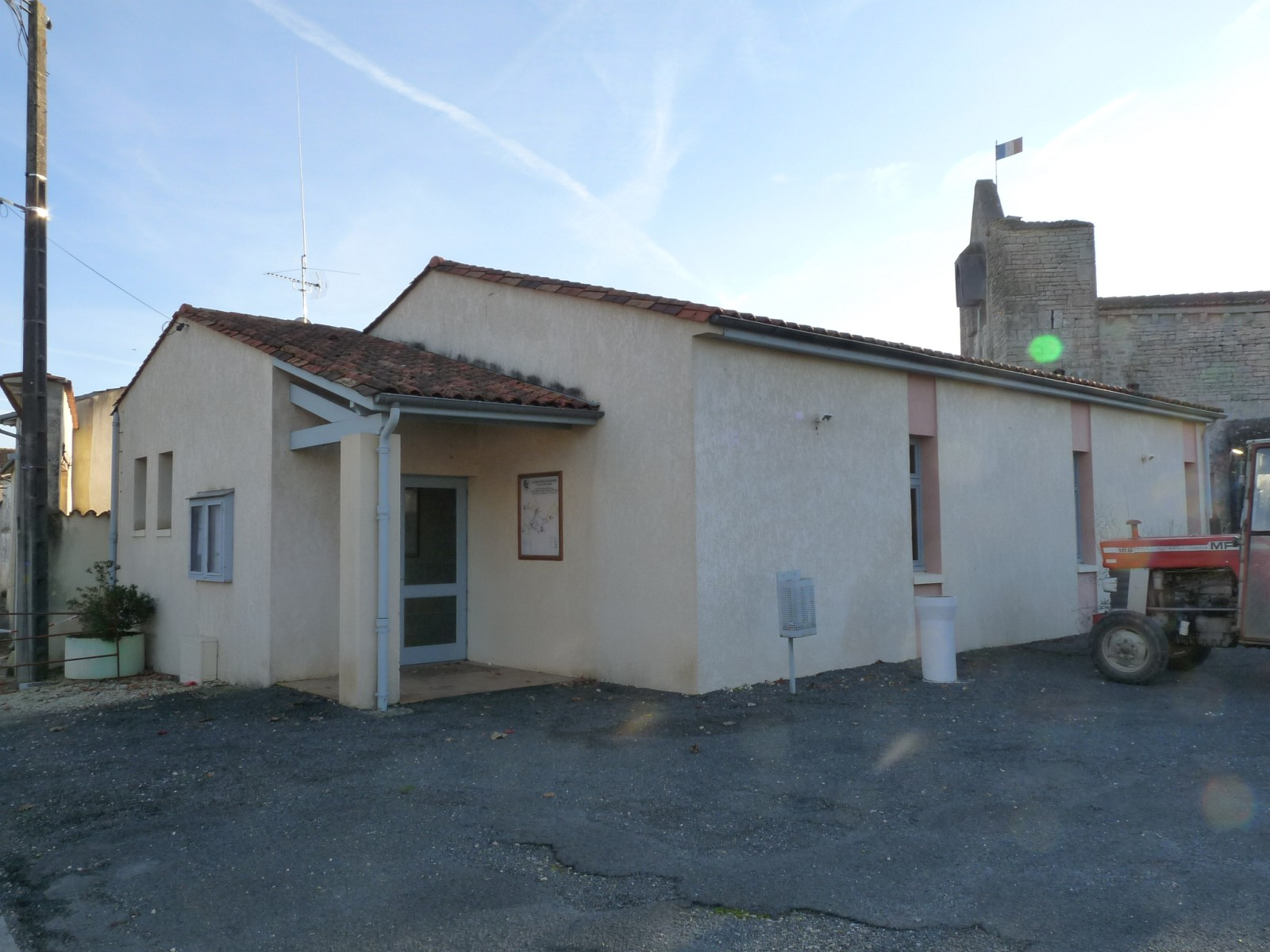 Salle des fêtes, Louzignac, Charente-Maritime, France